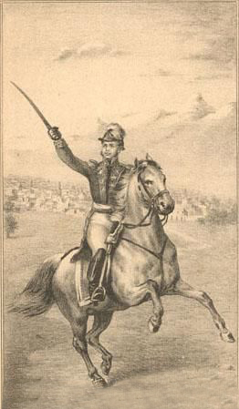 Bernardo O'Higgins, 1778-1842 en "Vida del jeneral don Bernardo O'Higgins : (su dictadura, su ostracismo) / por Miguel Luis Amunátegui y Benjamín Vicuña Mackenna. Santiago : Rafael Jover, 1882. 528 p. : ilustraciones, retratos, planos"